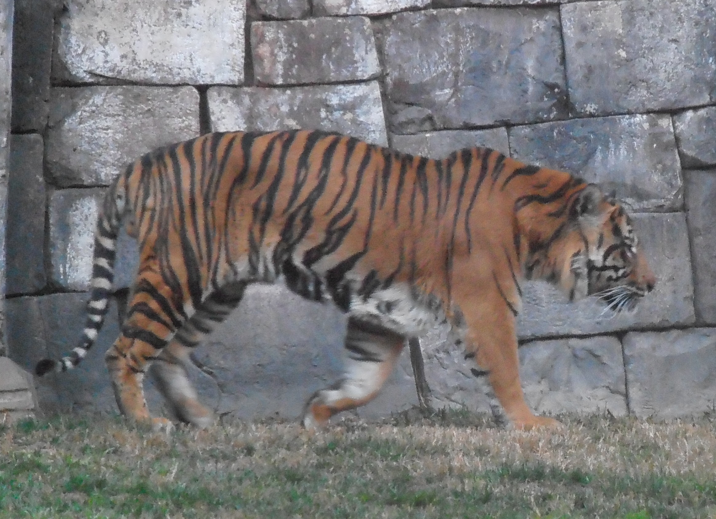 Tigre di Sumatra (Bioparc di Fuengirola)